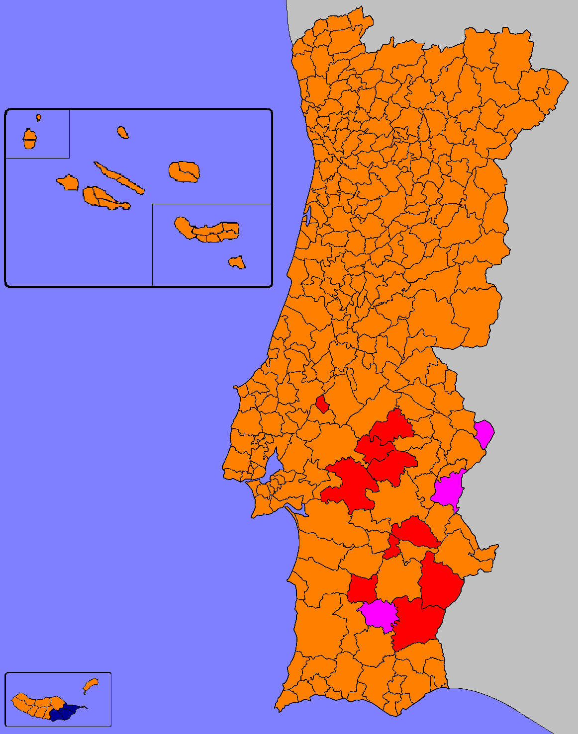 Mapa ilustrativo do candidato mais votado por Concelho